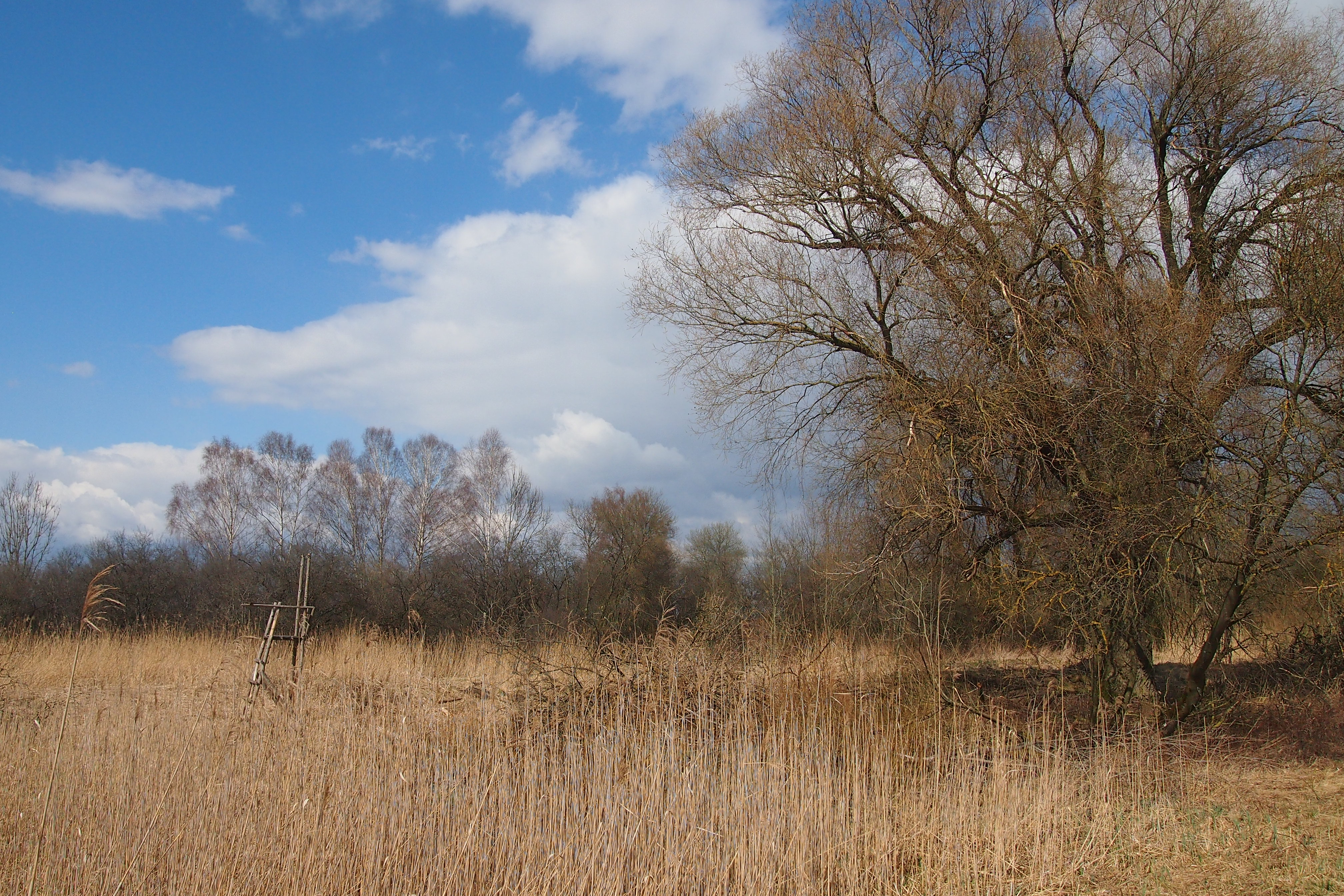 Blick über die Mertinger Höll' ("Mertinger Hölle") im Frühling.